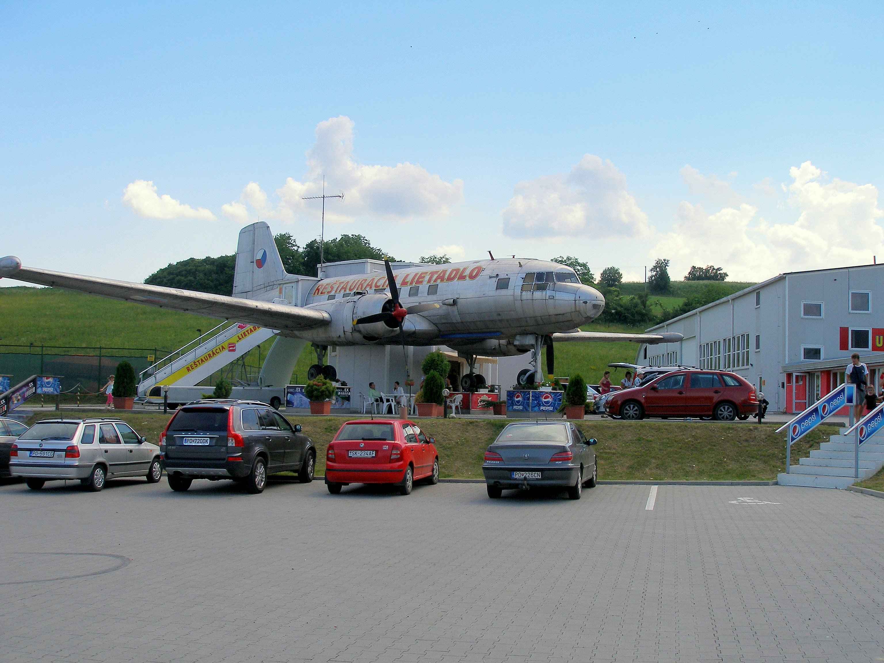 Obec Podlipníky okres Vranov nad Topľou.